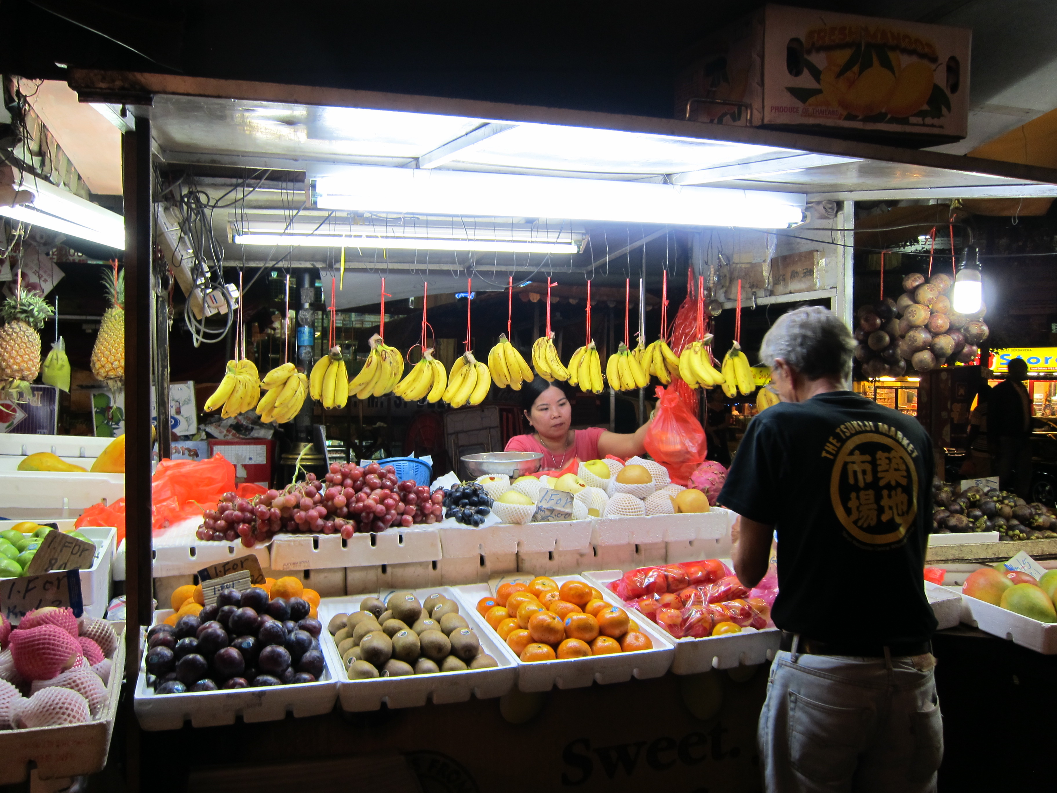 fruit stand in jalan alor